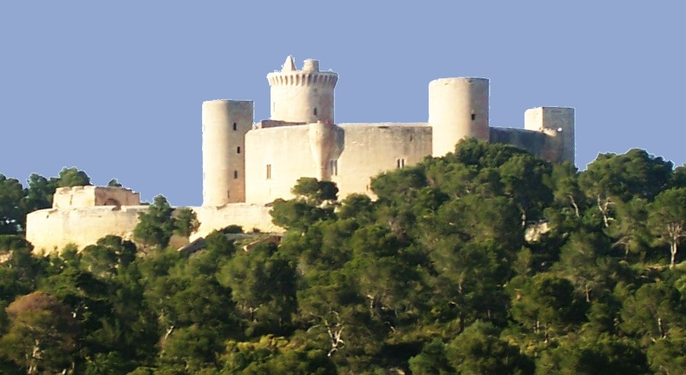 Castell de Bellver (Palma, Països Catalans), des del sud-oest.